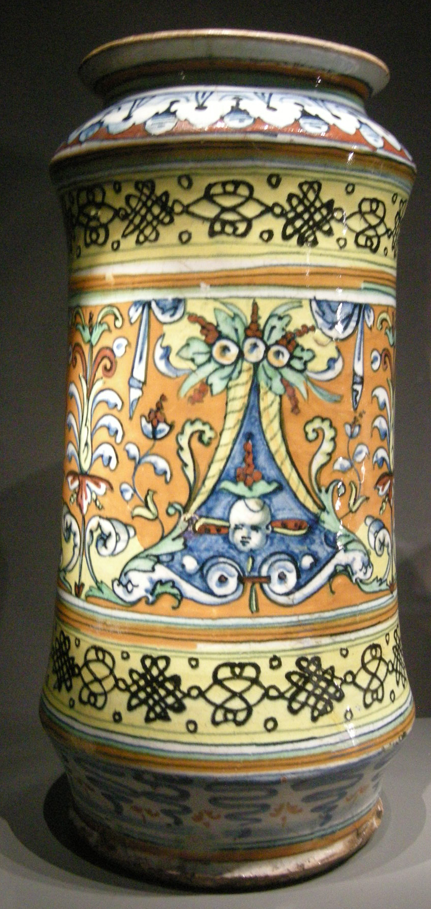 Ngv, maiolica di siena, contenitore da farmacia, 1510 circa